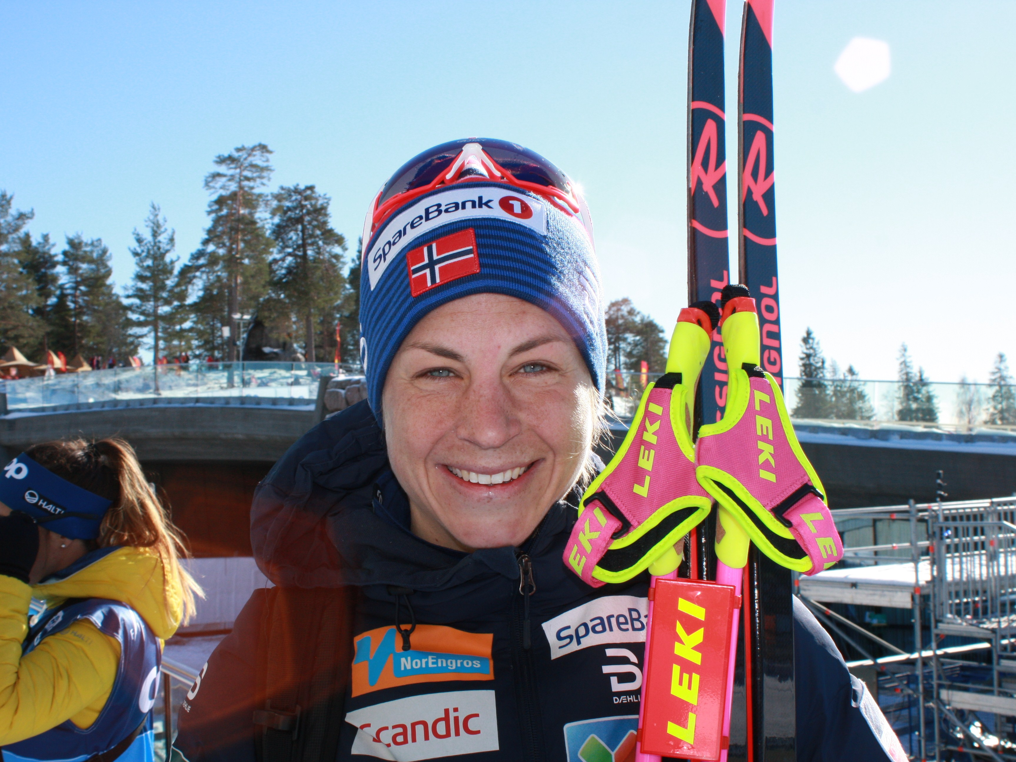 Astrid Jacobsen am 10.03.2019 beim Holmenkollenrennen in Oslo